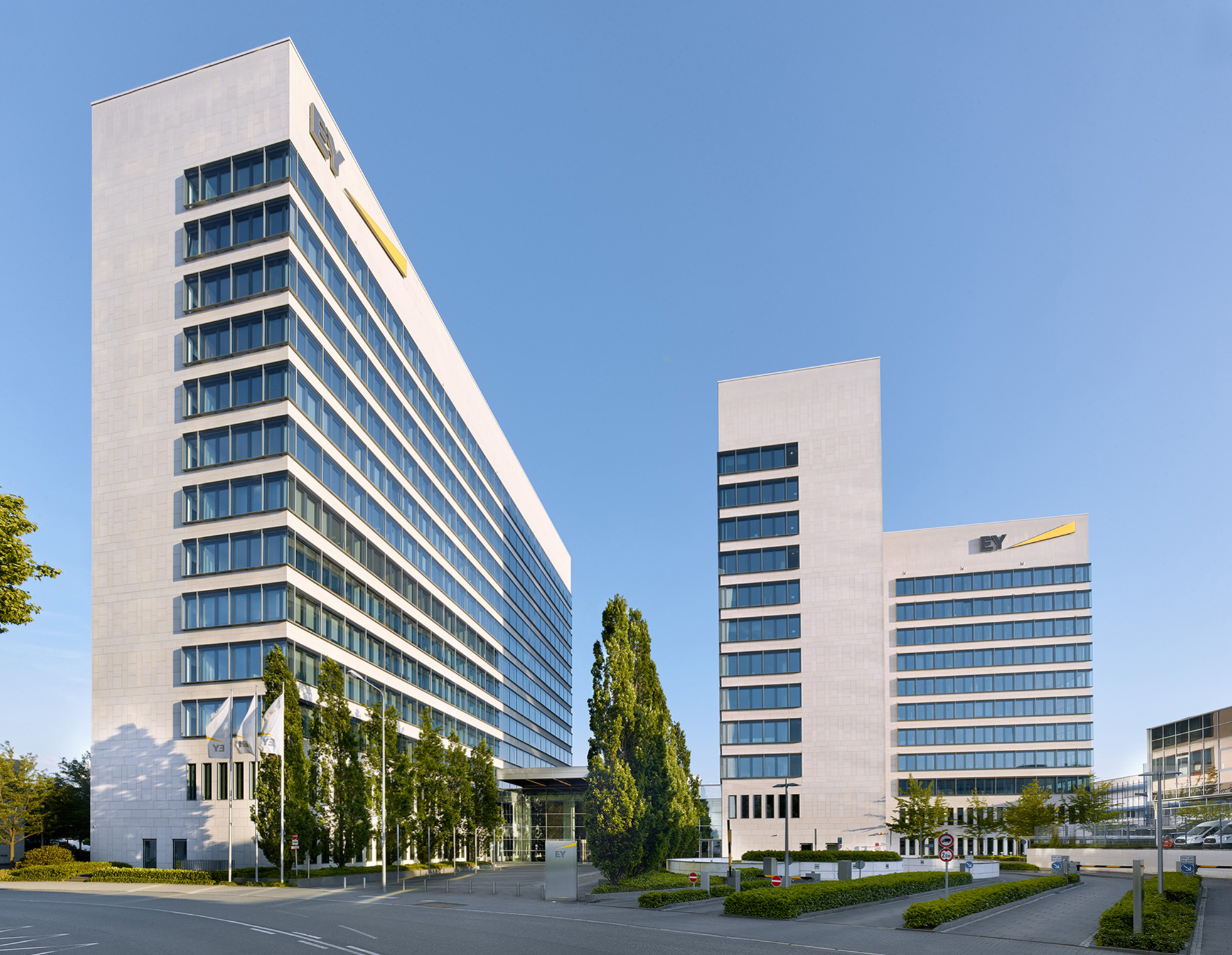 Sitz von Ernst & Young in Eschborn, Frankfurt